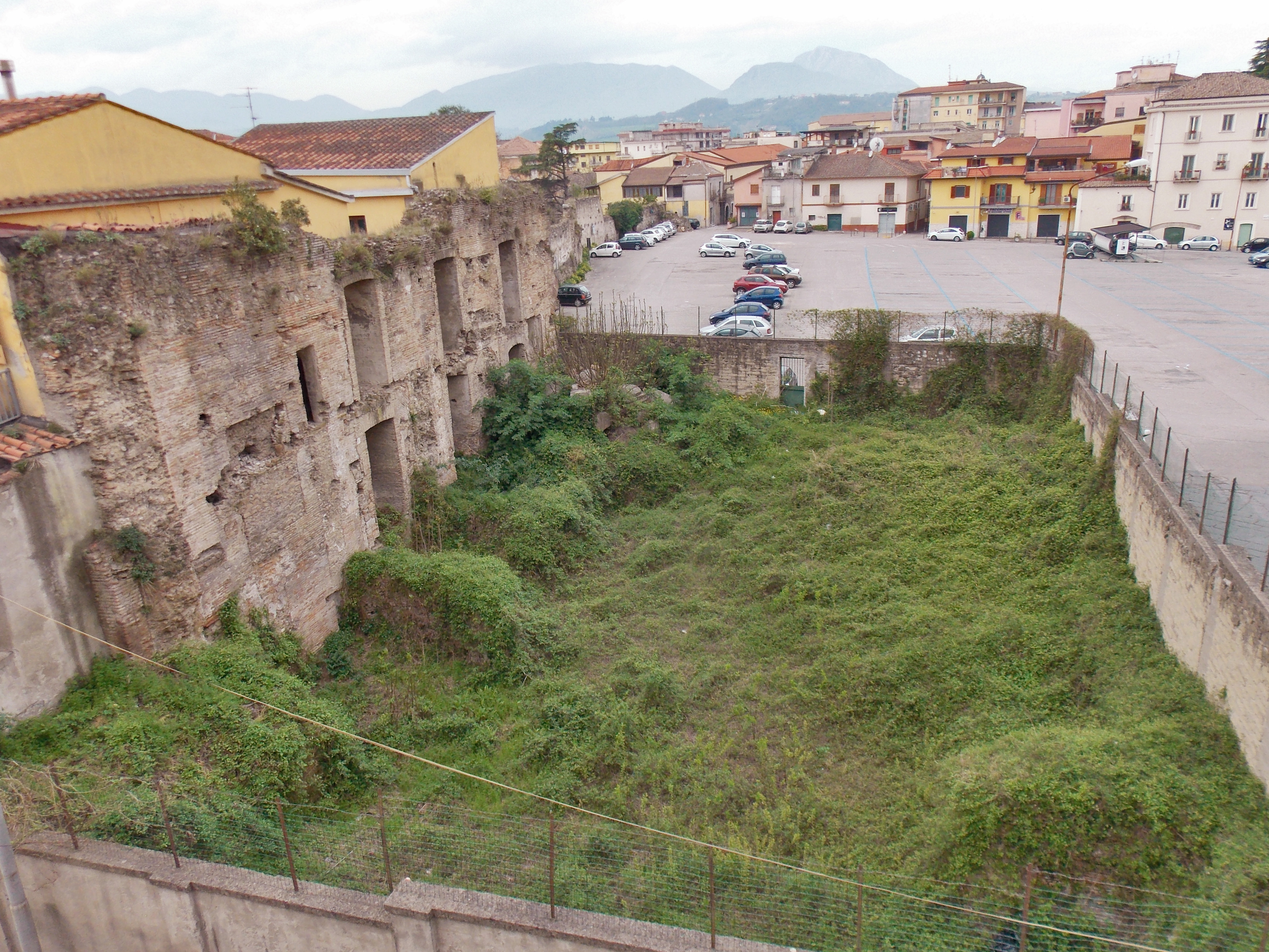 I resti della chiesa del monastero di San Pietro delle Monache (Benevento)